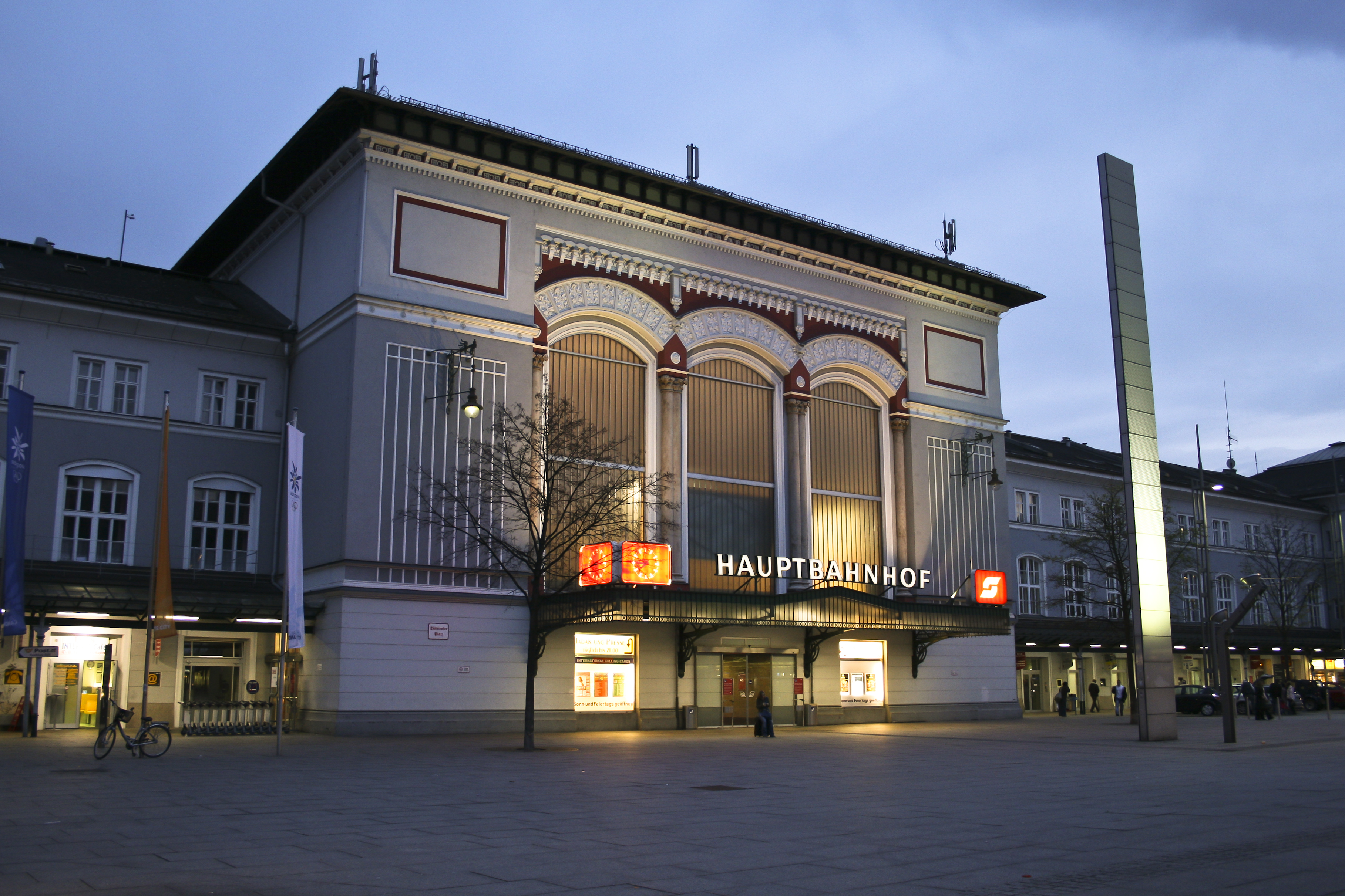 Hauptbahnhof Salzburg, Aufnahmegebäude